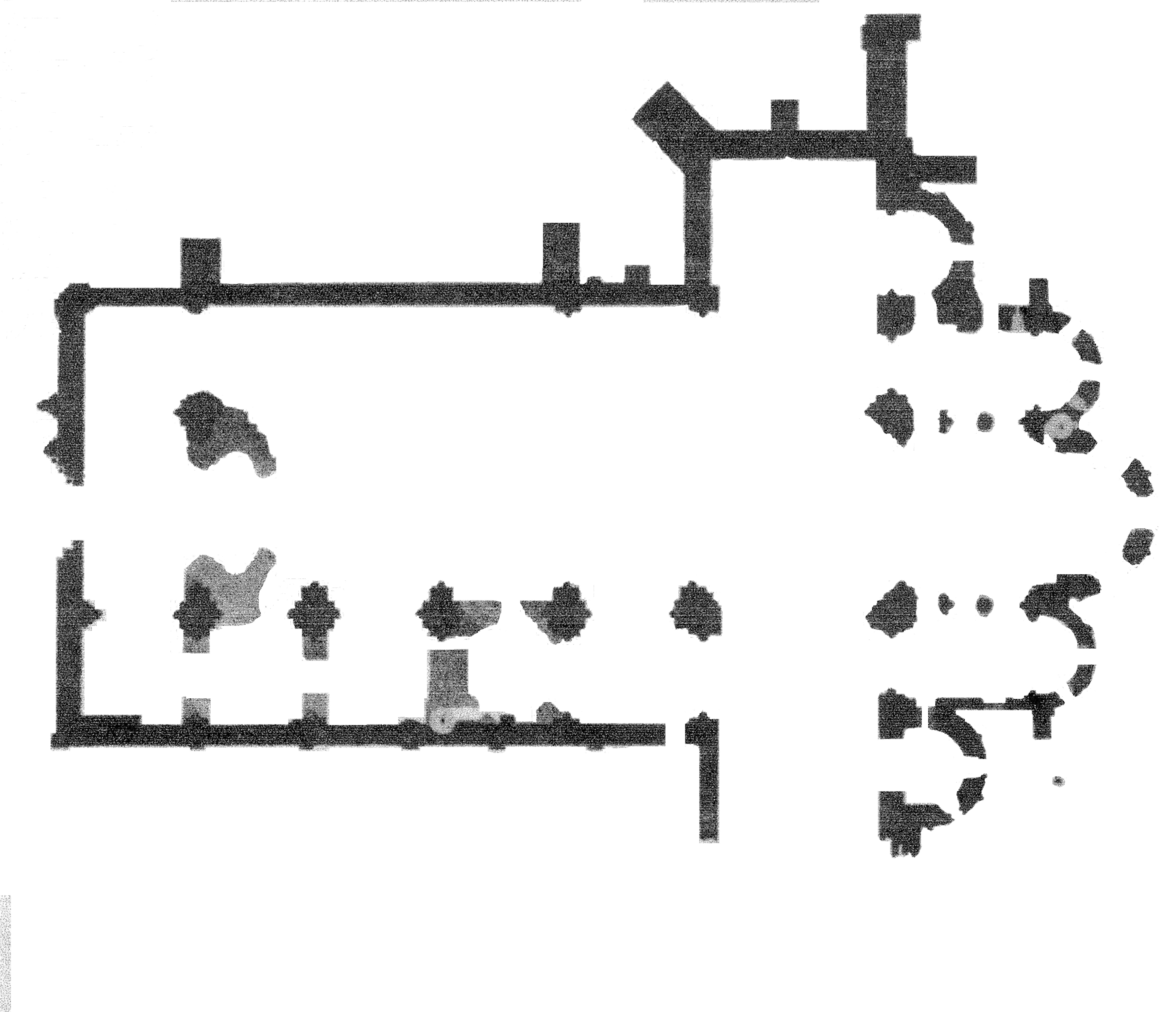 Plan de l'église Notre-Dame de la Sauve-Majeure